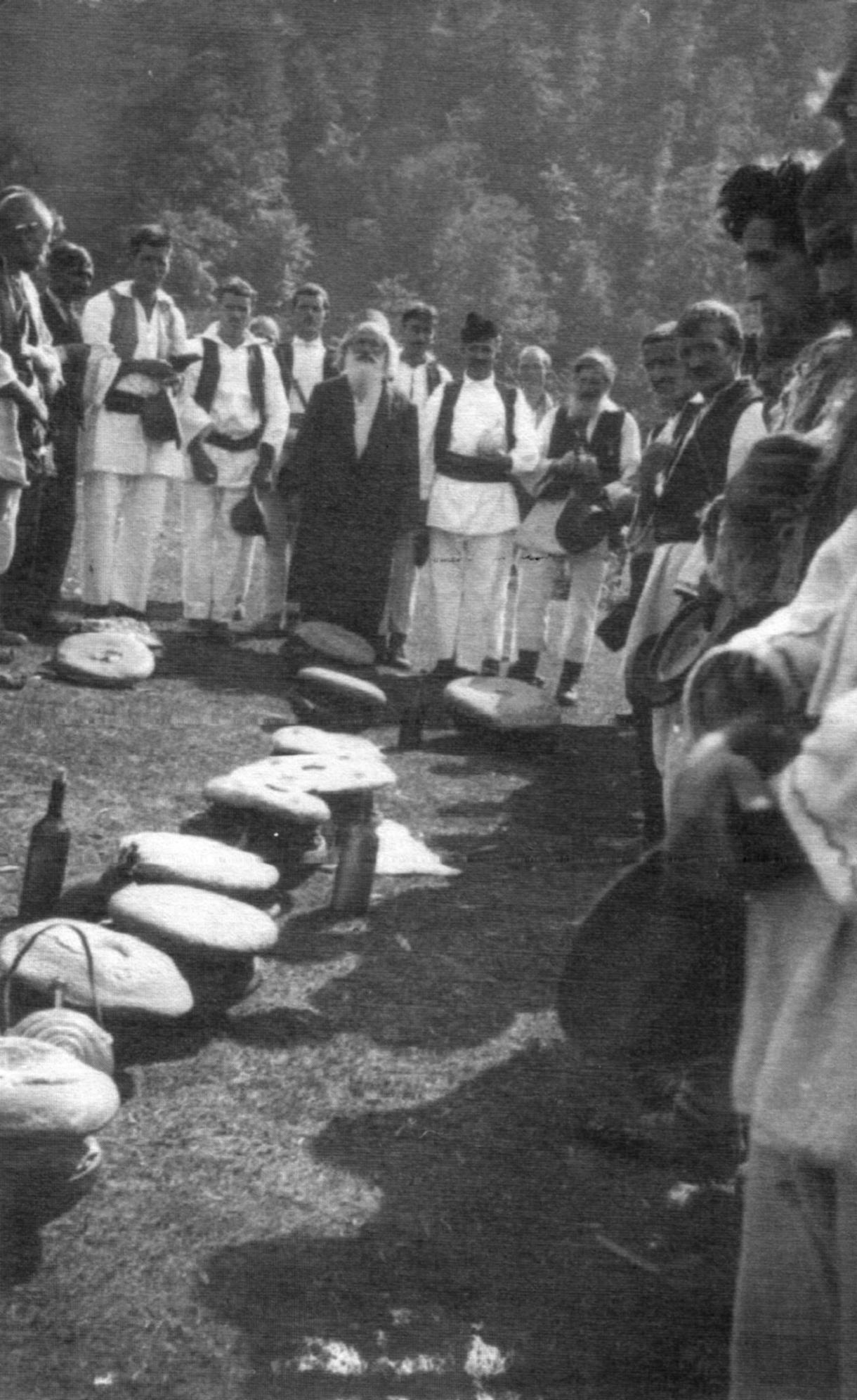 Сеоска масла у прибинићу код Теслића, у Републици Српској. Средишња личност је прота Коста Душанић (1835—1911), остало су мјештани села. Аутор фотографије непознат. Фотографија се без нарочитих ауторских права користи у више публикација које обрађују Теслић, Прибинић и околину и обичаје са тог подручја. Сви ликови са фотографије су давно преминули. Ова фотографија је скенирана из књиге проф. Јована Б. Душанића Липљанског „Прибинић - место у Републици Српској“, гдје није покривена нарочитим ауторским правима. Скенирао корисник 2e1a0.